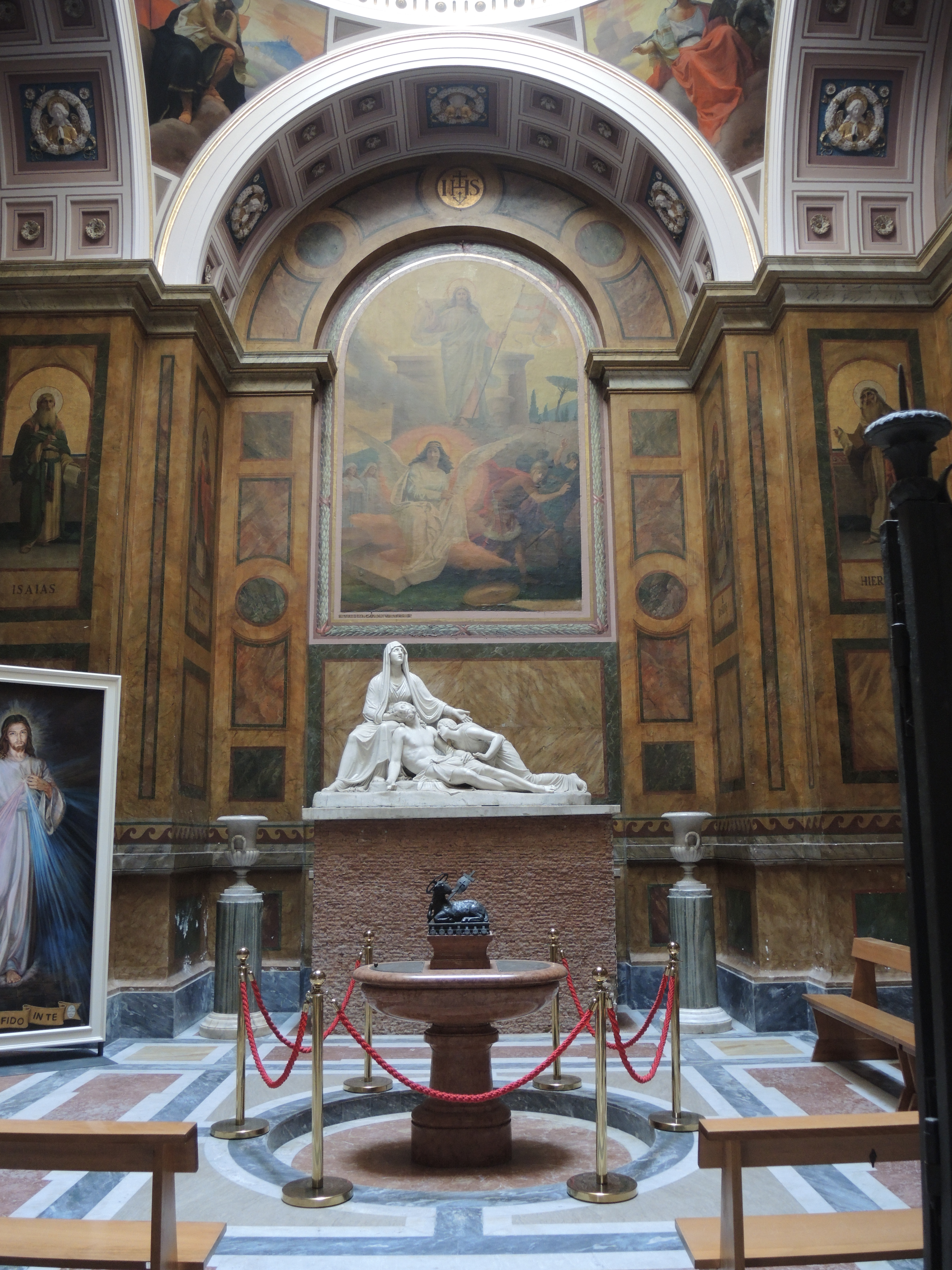 Terracina: Chiesa del Santissimo Salvatore